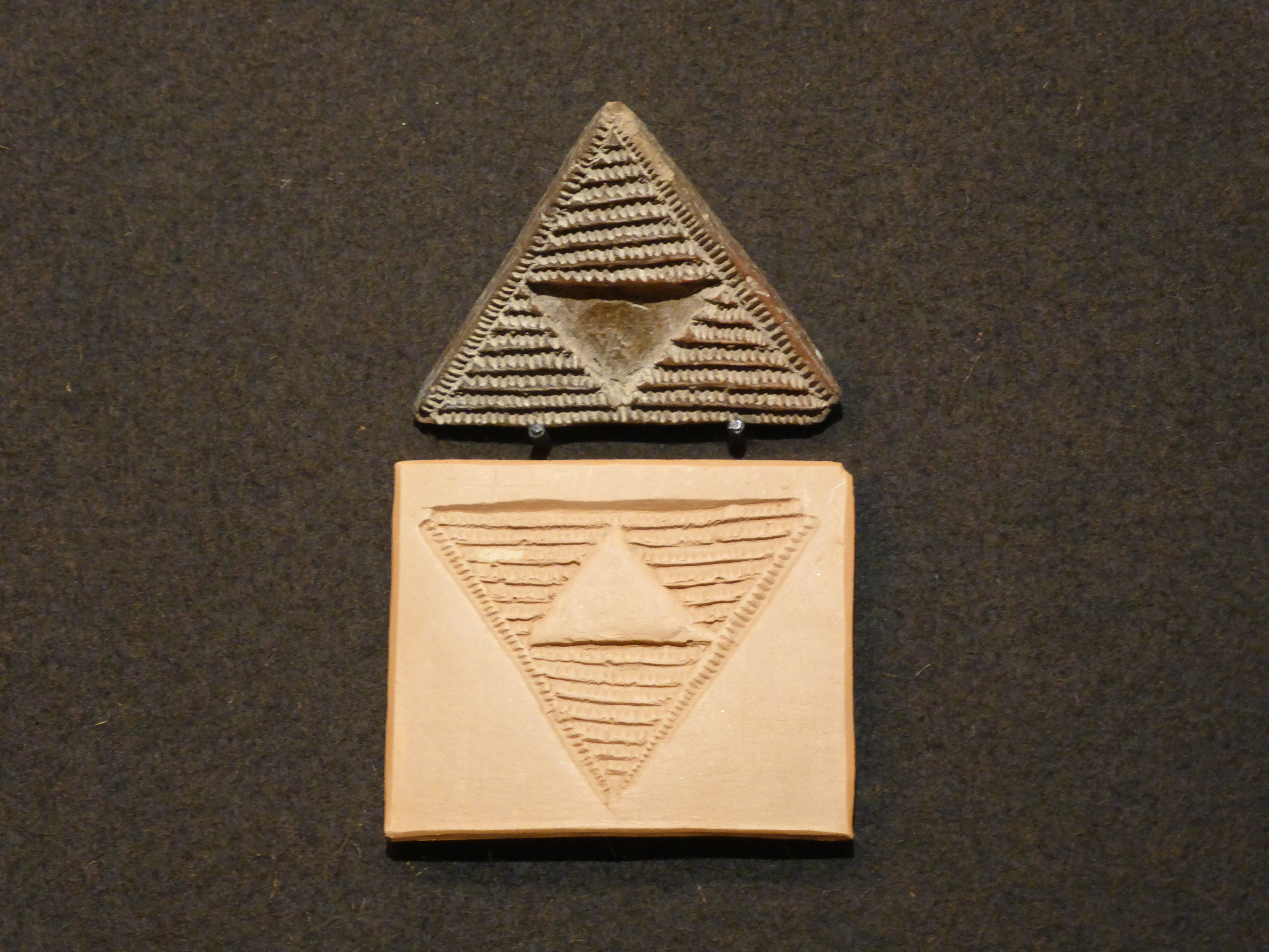 Las pintaderas son sellos de barro cocido, de los antiguos canarios. Son de época anterior a la conquista castellana de finales del siglo XV. En el Museo Canario, de Las Palmas, se conservan muchas pintaderas. Arriba vemos la pintadera original, y abajo su huella en barro.